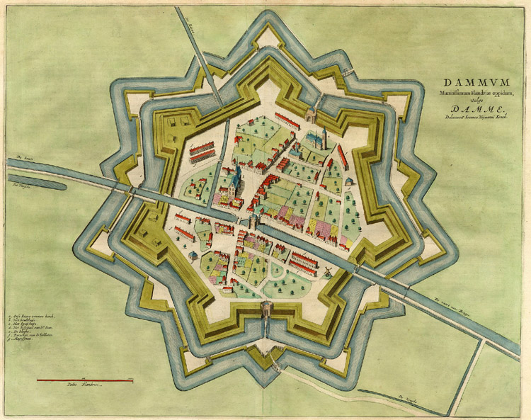 Dammum Munitissimum Flandriae oppidum, Vulgo Damme